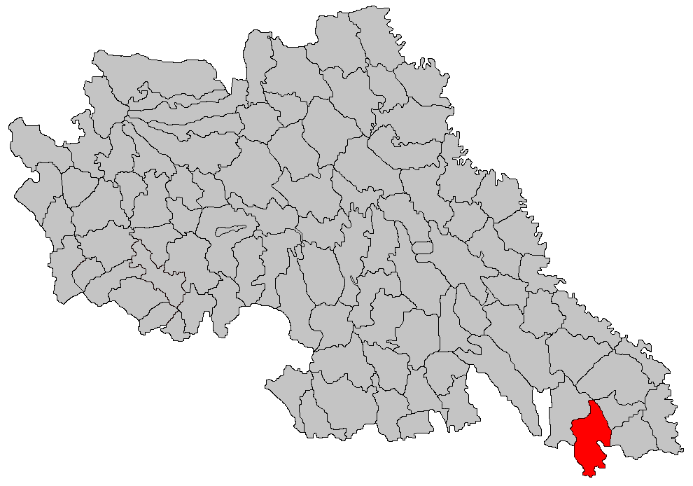 Categorie:Hărţi ale judeţului Iaşi